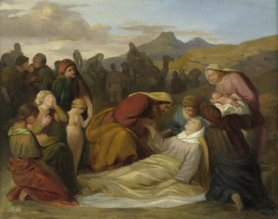 Gustav Ferdinand Metz (1817-1853): "Der Tod Rahels nach der Geburt Benjamins". Öl auf Malpappe. 30,5 x 38 cm